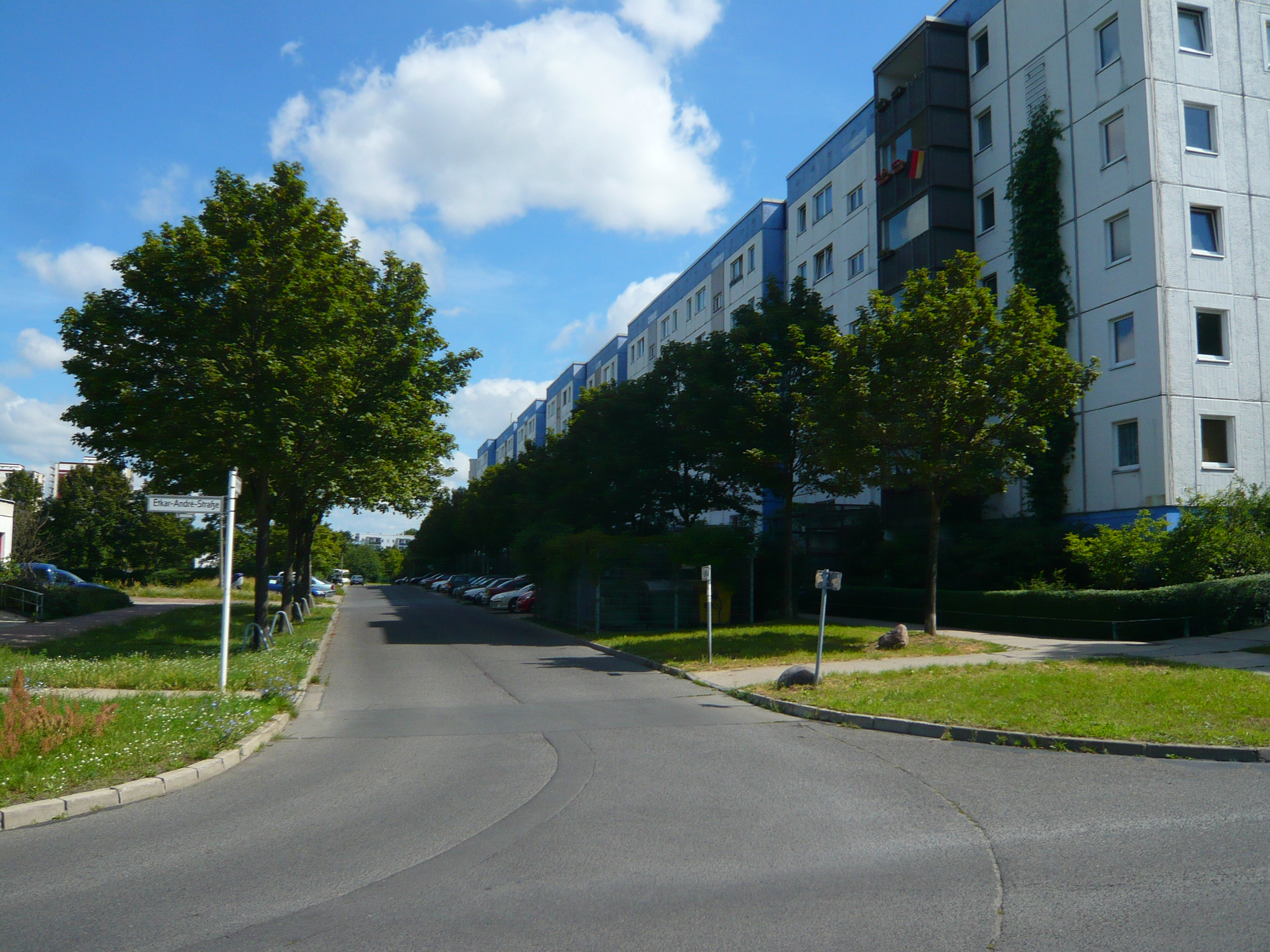 Berlin-Hellersdorf, Carola-Neher-Str.